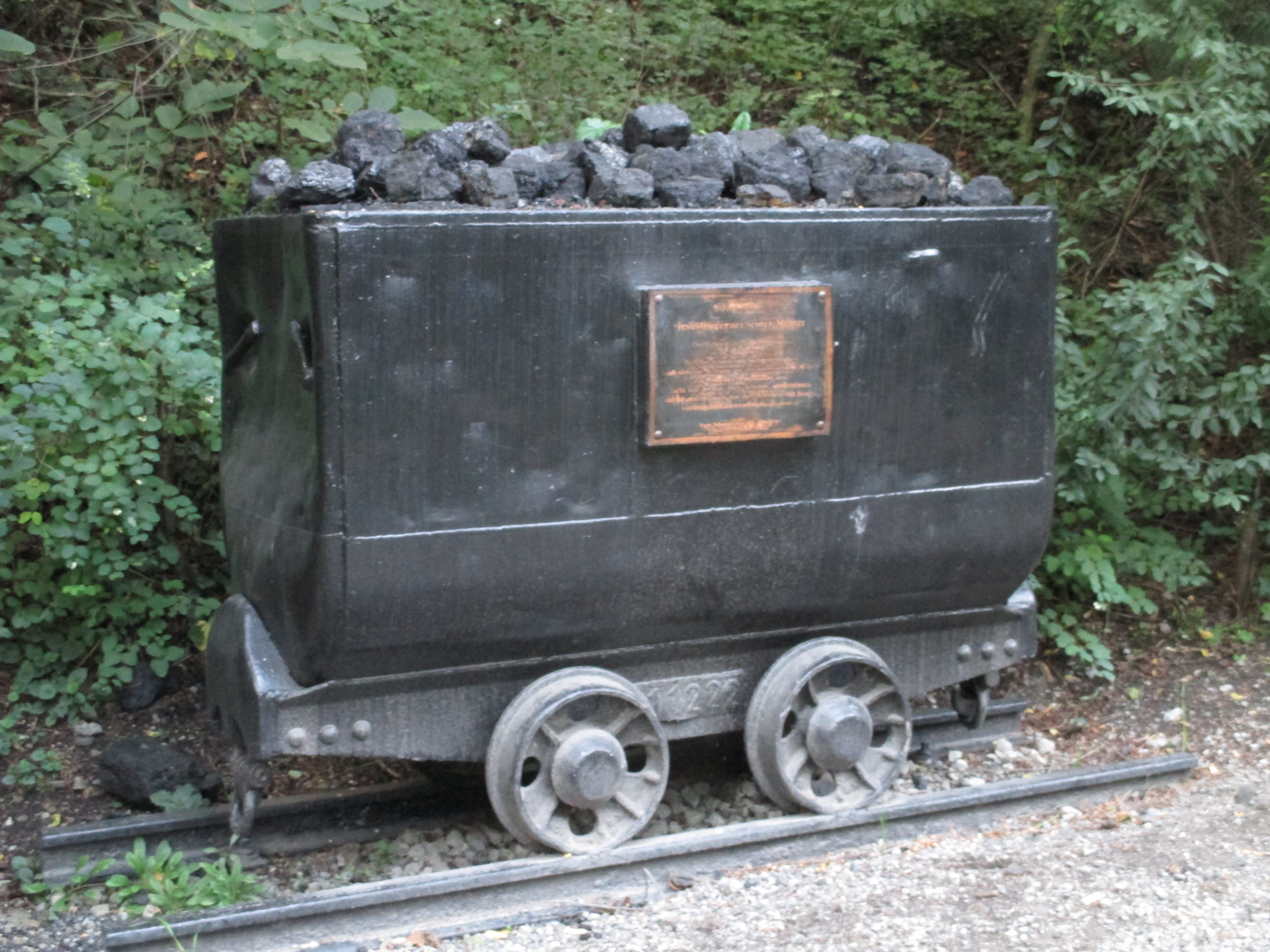 Station 4 des Bergbaukreuzweges an der Halde Haniel in Bottrop.